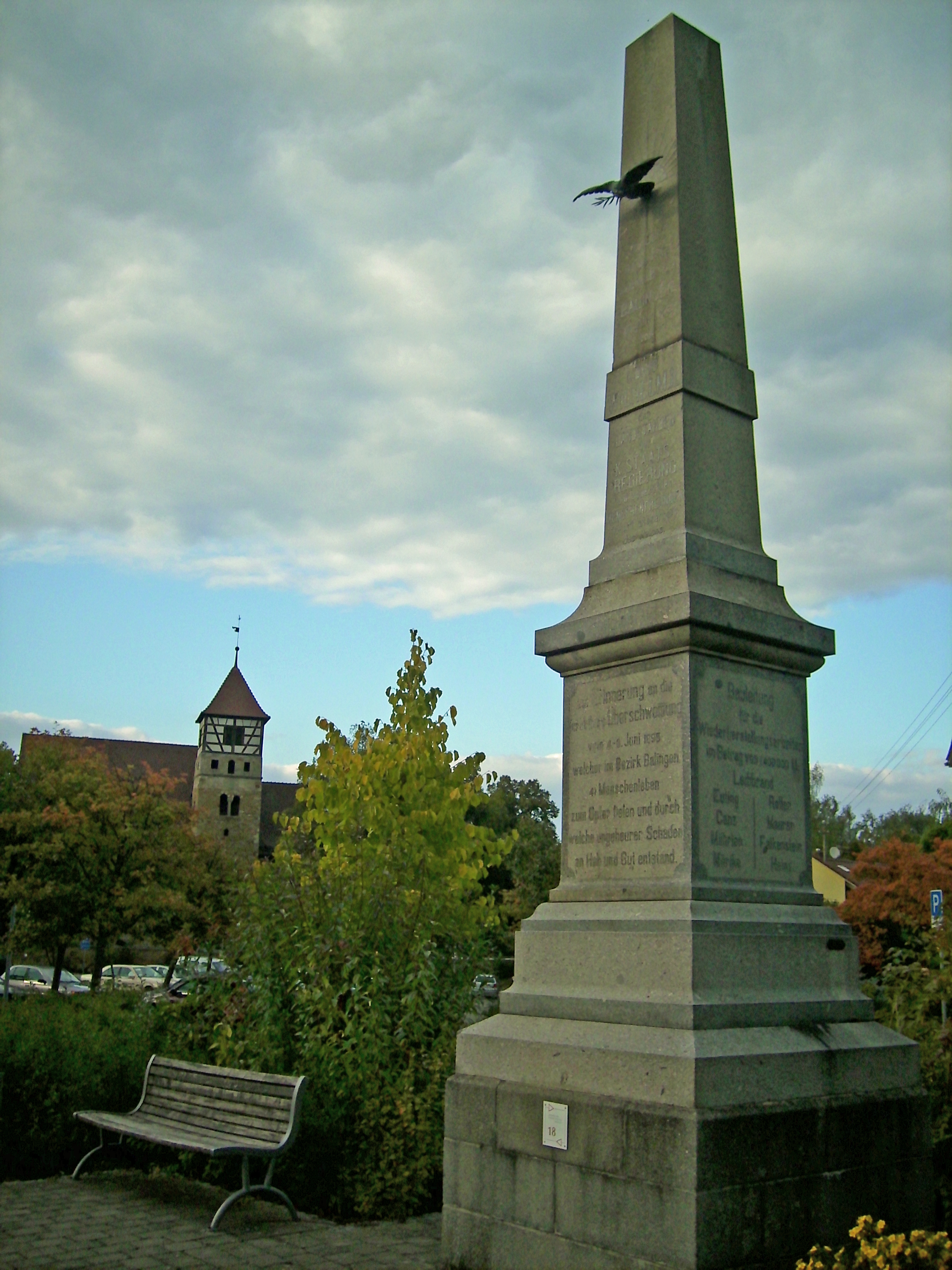 Balingen Denkmal für die Opfer der Hochwasserkatastrophe von 1895 und den Wiederaufbauhelfern